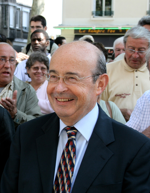 Jean Germain, maire de Tours